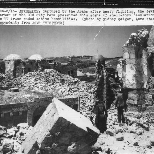 ירושלים 1948 - הרס הרובע היהודית של העיר העתיקה